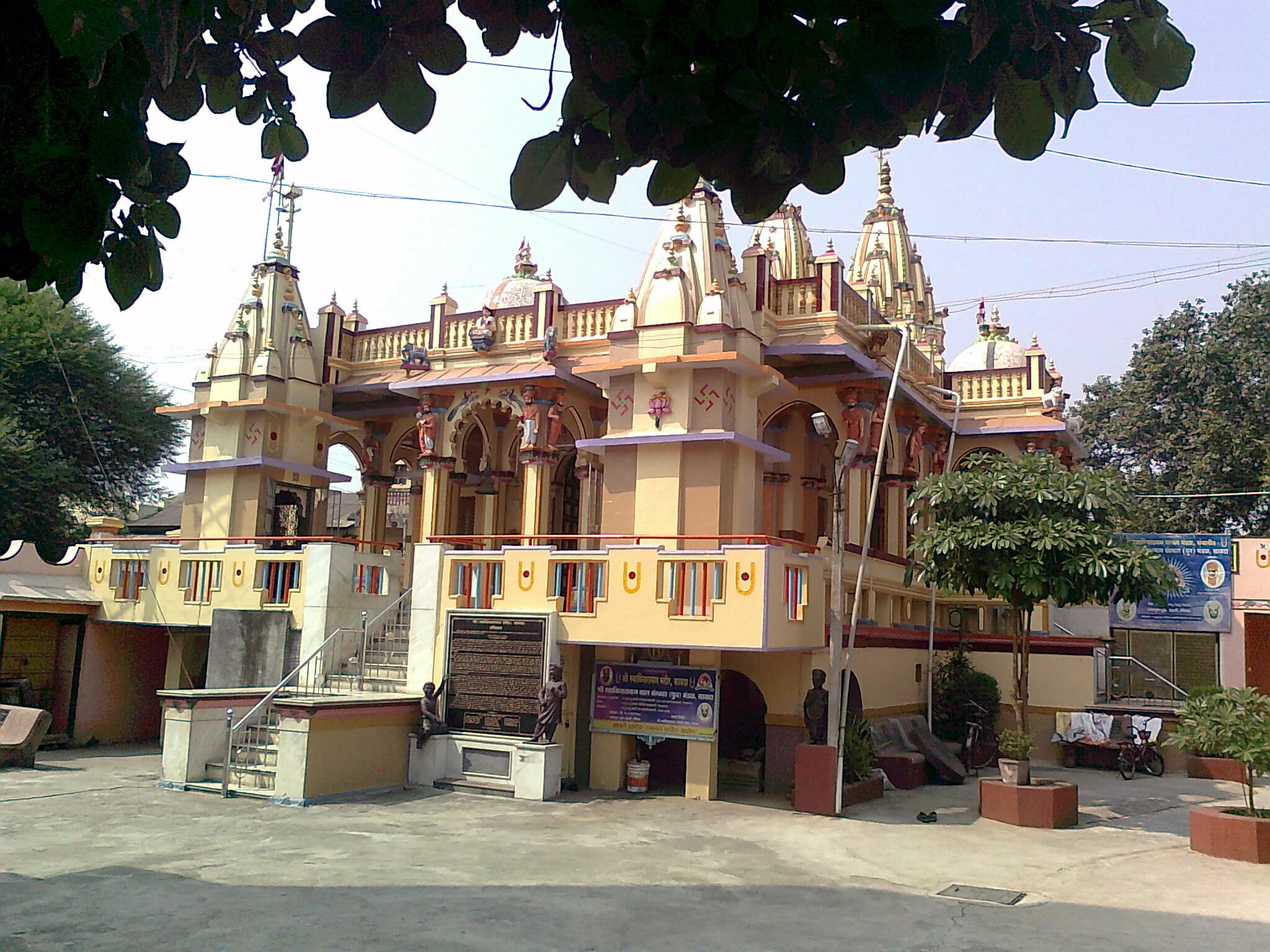 Swami Narayan Mandir at Savda, India.